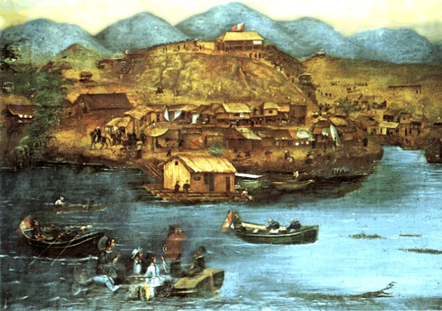 Pintura del siglo XIX, conservada en el Museo Nacional de Historia de Lima, que representa la toma de Guayaquil por parte del ejército peruano en 1860.